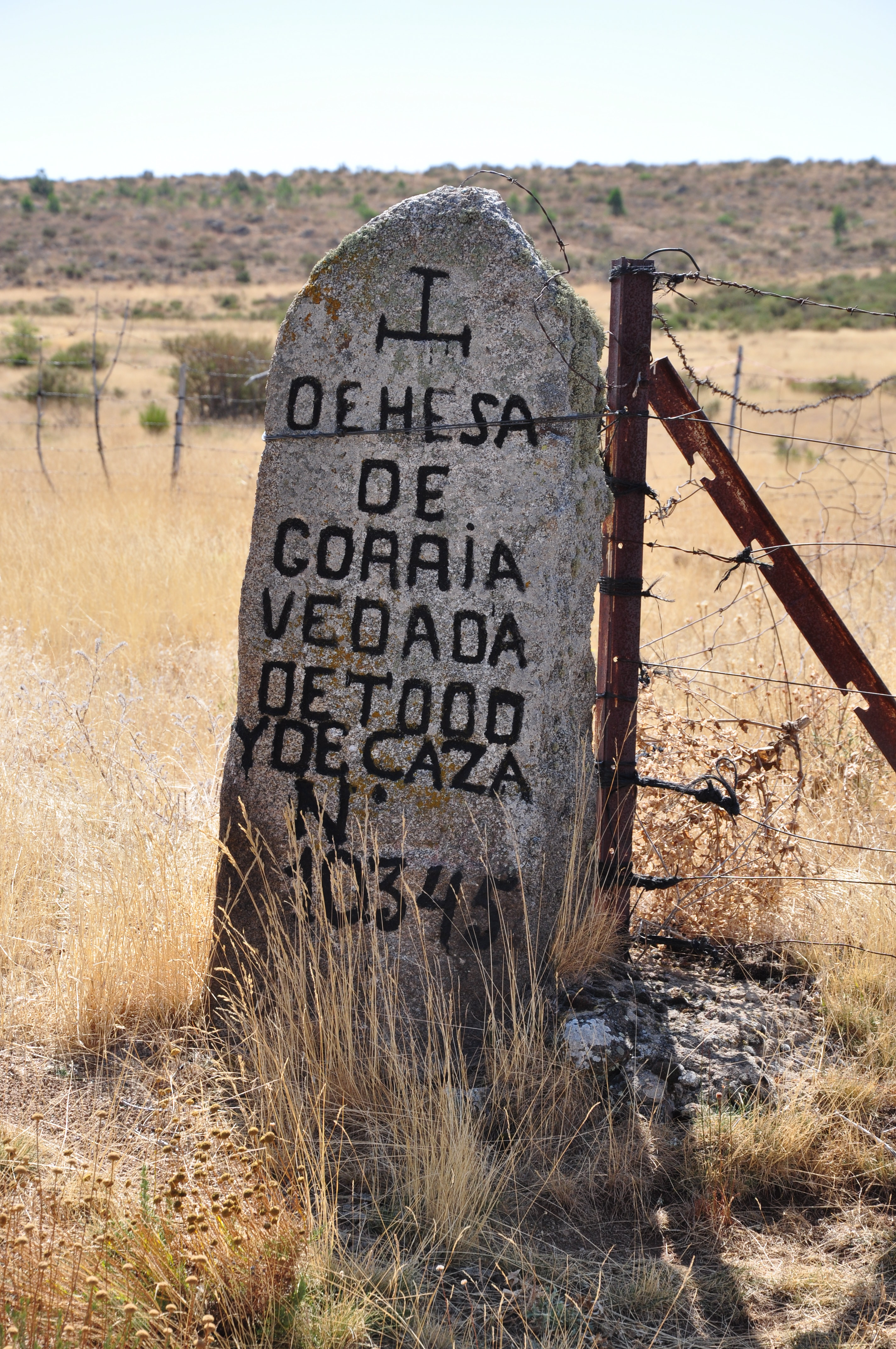 Coto de la Dehesa de Gorría (1431 m) junto a la Cañada Real Leonesa Occidental, entre Sanchorreja y Sanchicorto, Ávila, España.